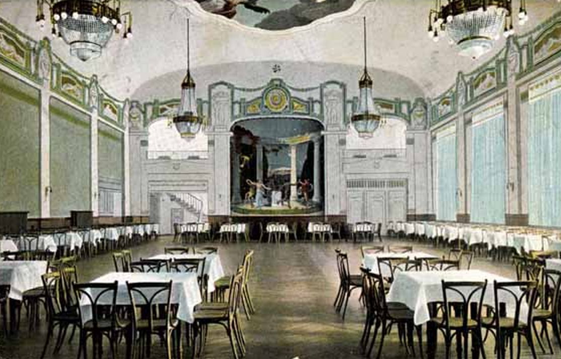 Berlin-Wedding Pharus-Säle 1908 Müllerstraße 142